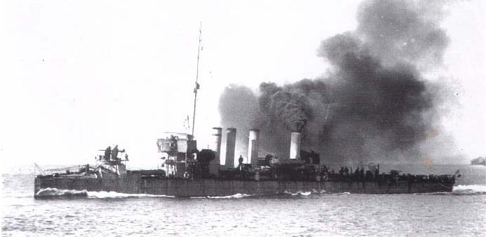 zerstörer S.M.S. Warasdiner